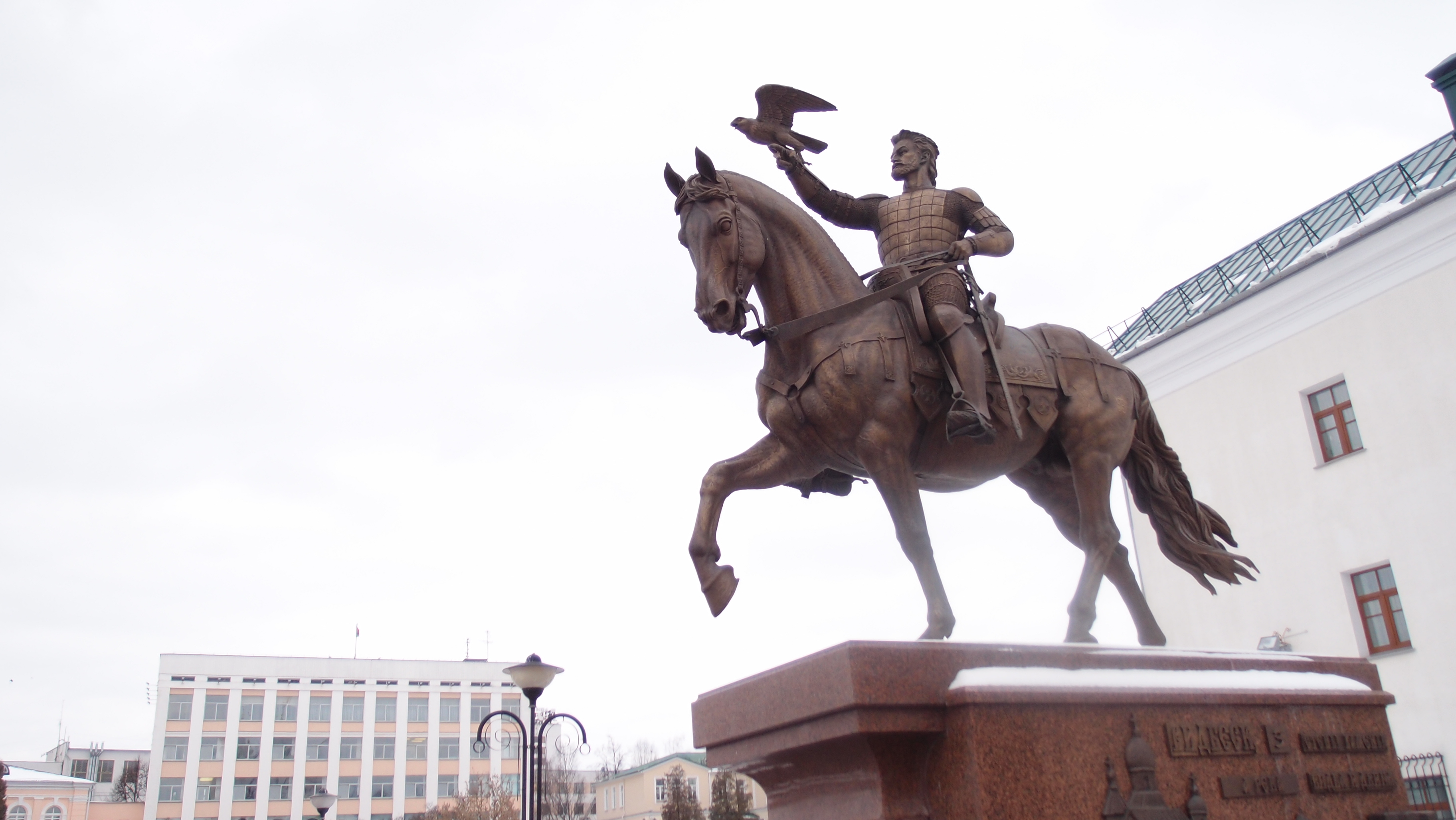 Alhierd monument in Viciebsk